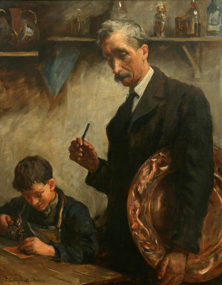 картины художника Стэнхоуп Александер Форбса (1857 - 1947)